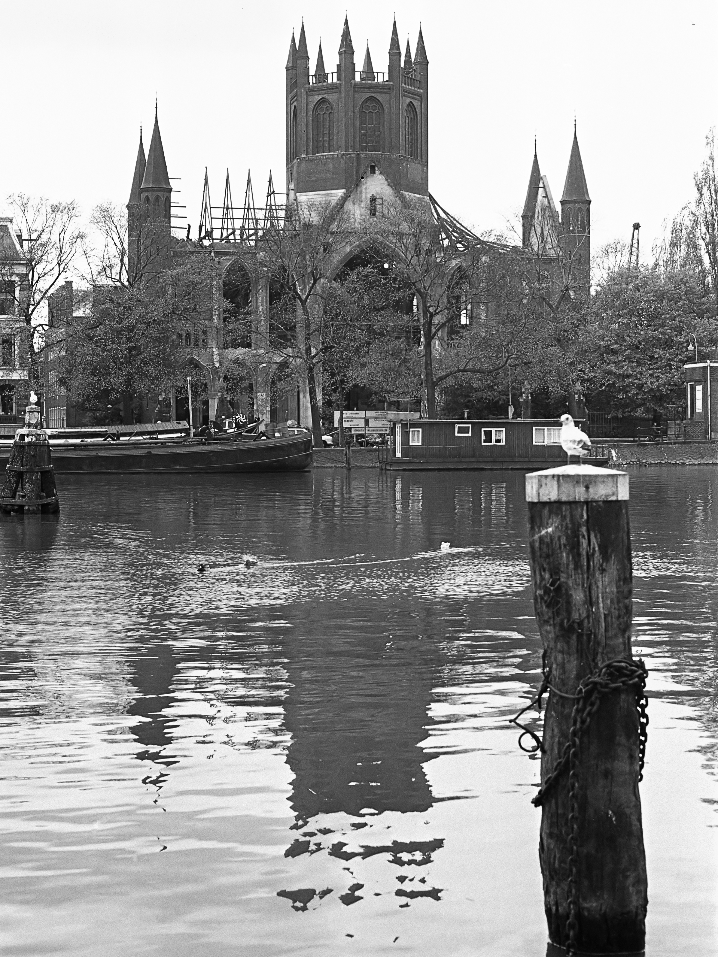 Afbraak Willibrorduskerk, Amsterdam 27 oktober 1970